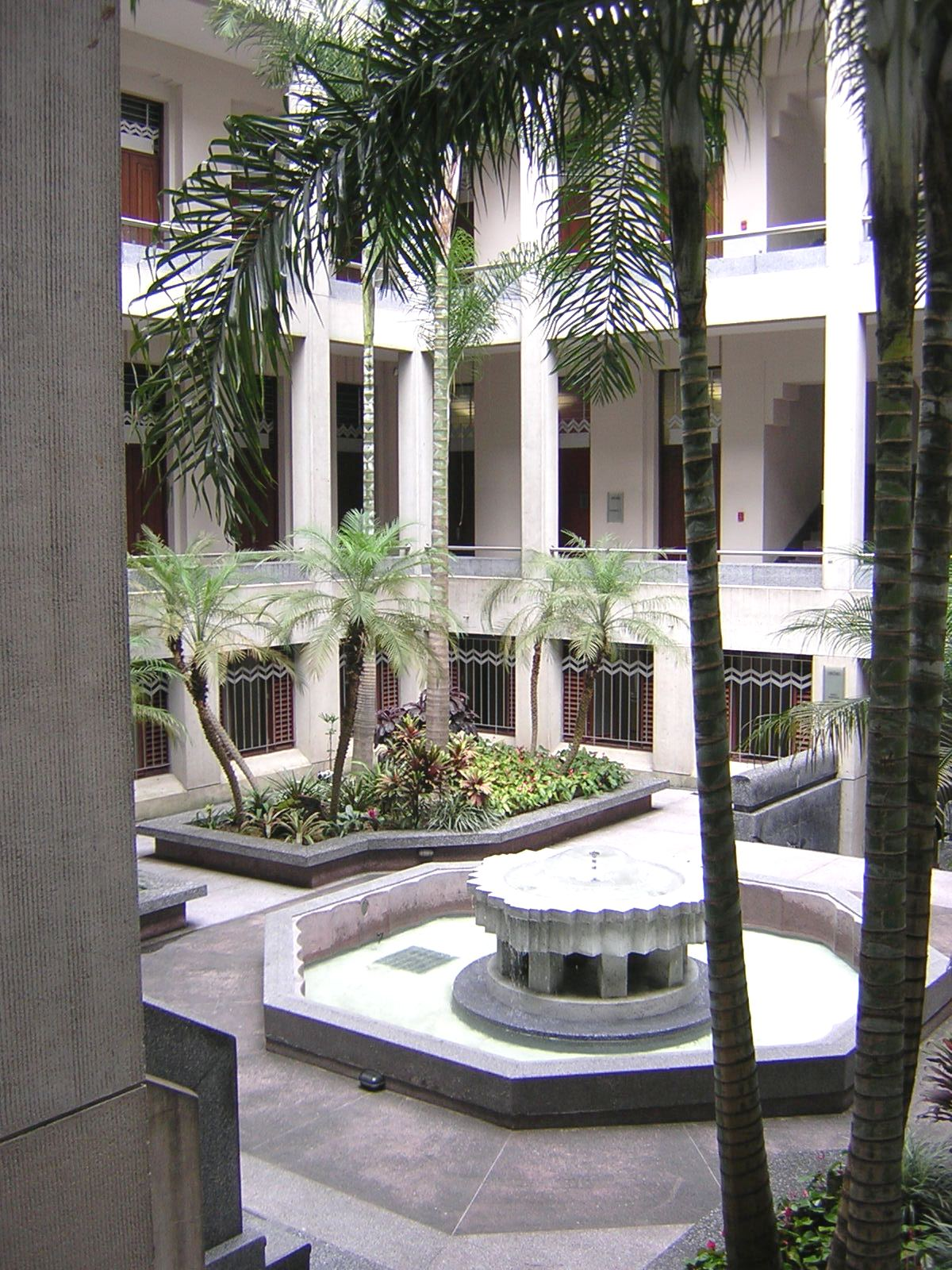 Museo de Antioquia, Medellín, Colombia.